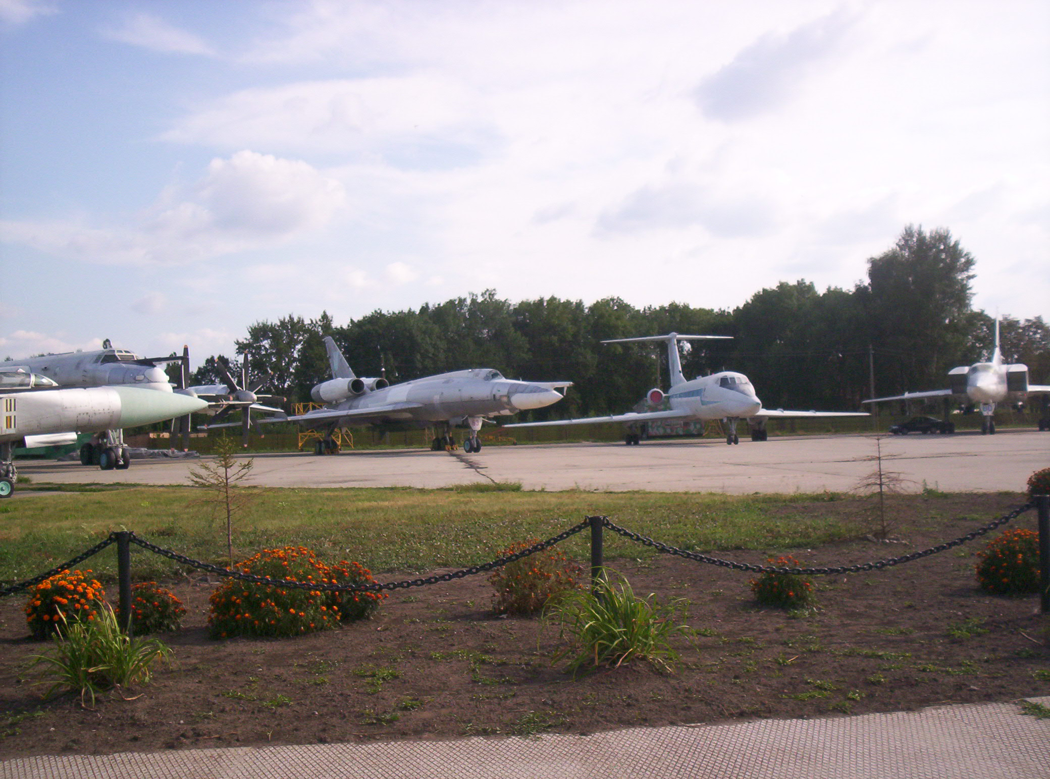 Самолёты в Полтавском авиамузее